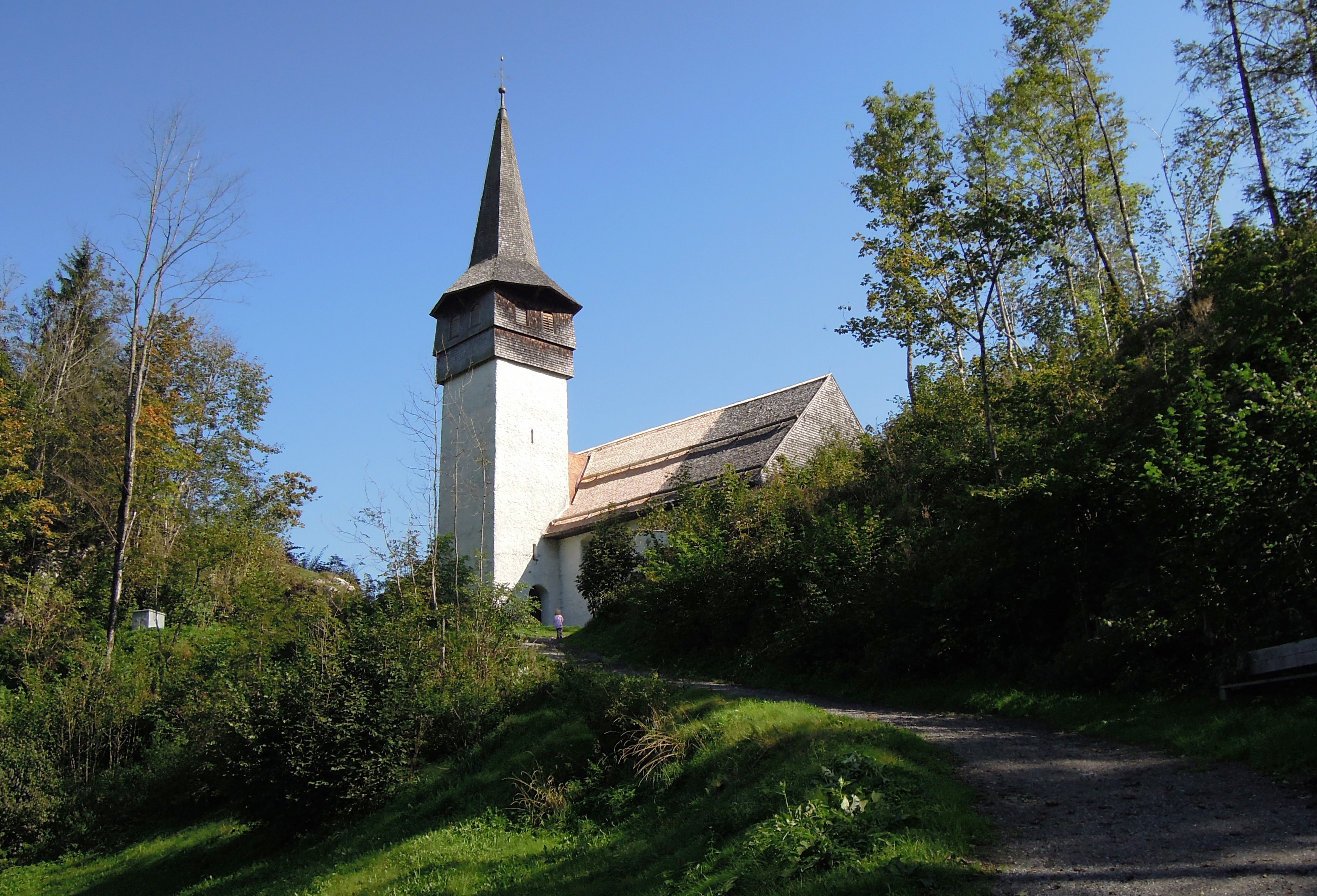 Die 1248 erbaute Pfarrkirche St. Jakobus in Reuthe.